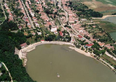 Panoramo de Bánk.